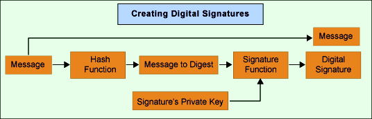 Монгол: тоон гарын үсэгийн ажиллагаа